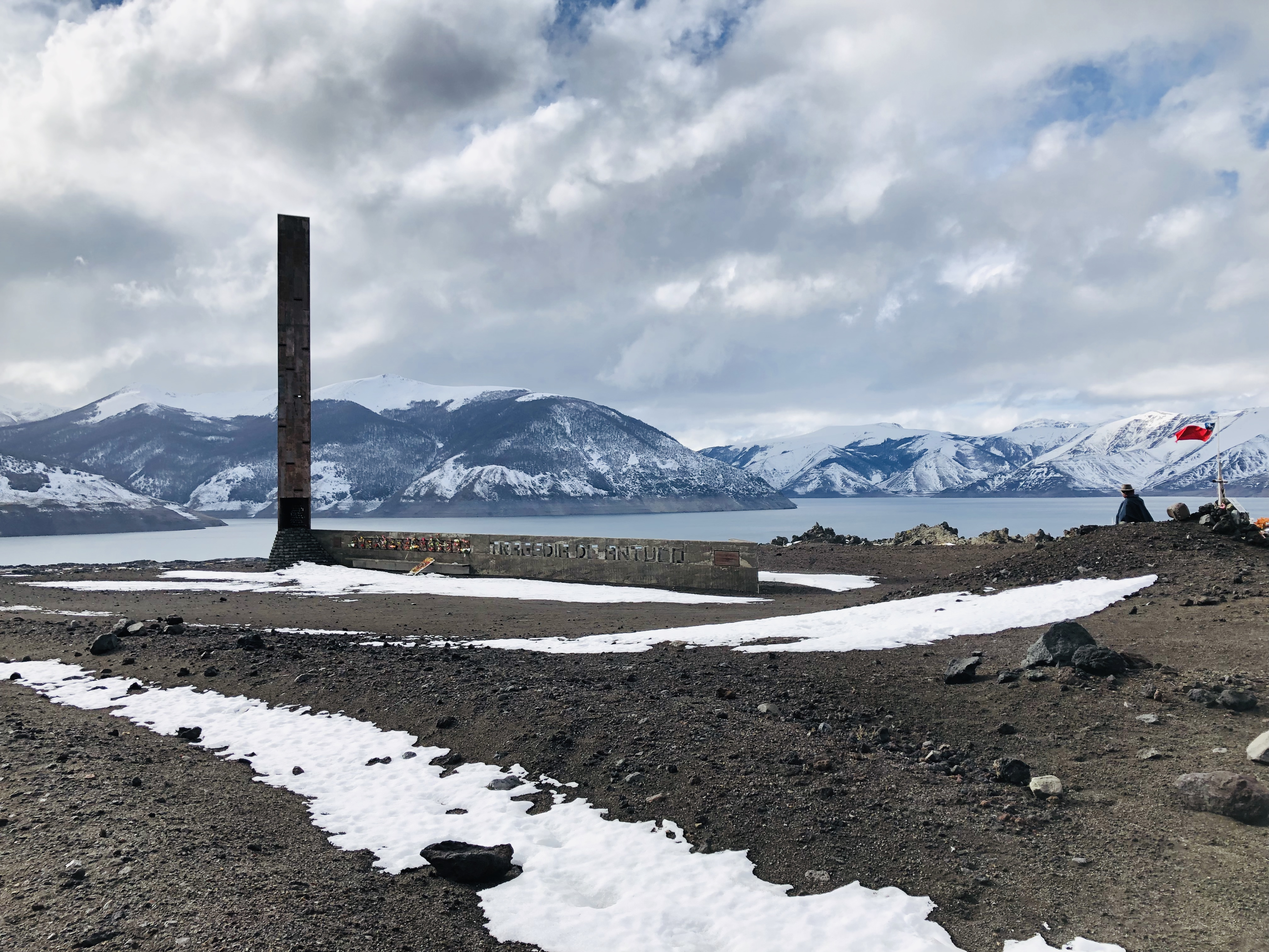 Parque nacional Laguna del Laja